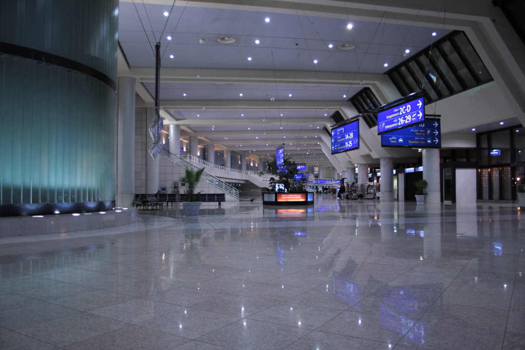 Aéroport d'Alger Algérie